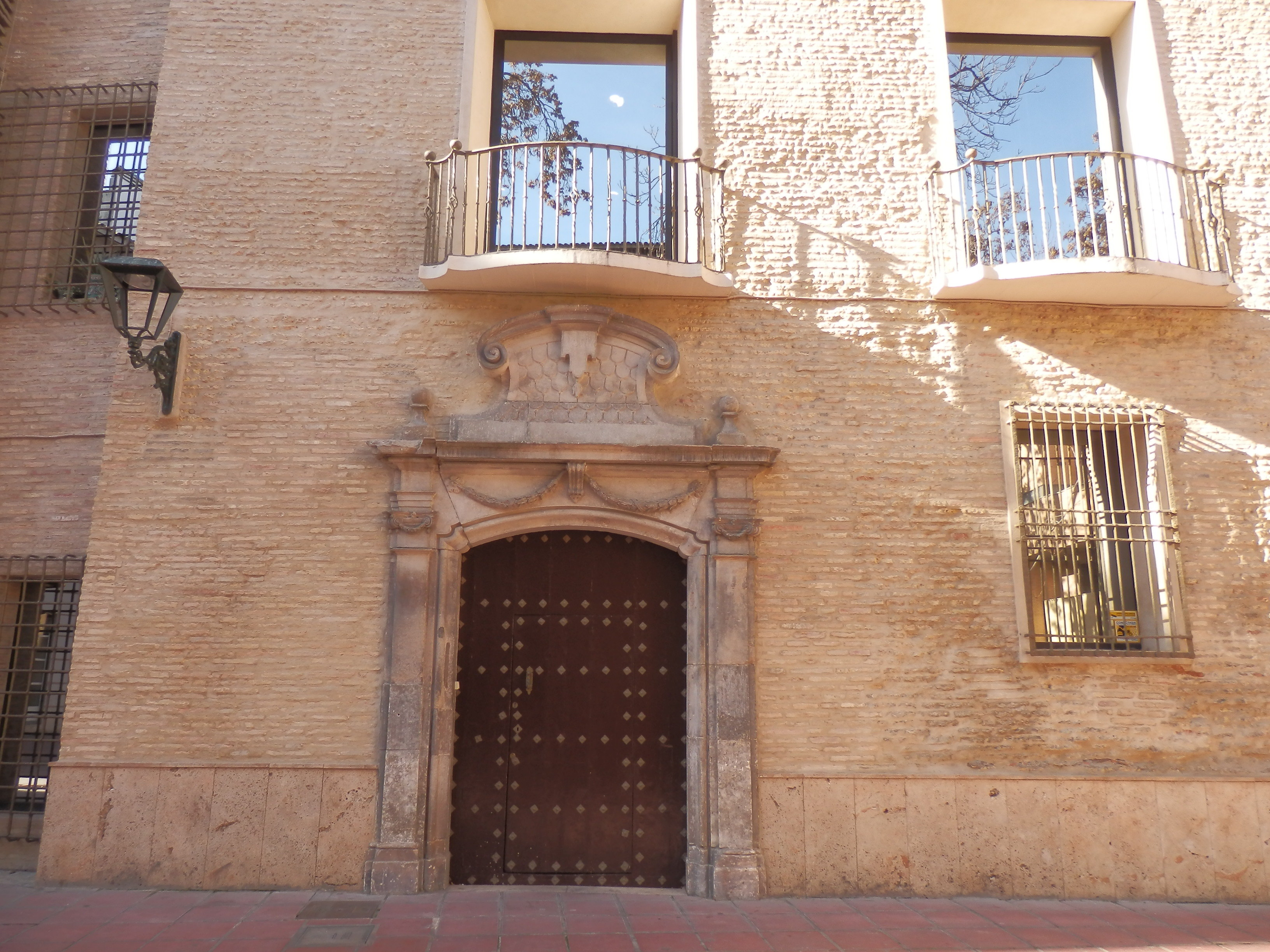 Casa Tarín en Zaragoza.